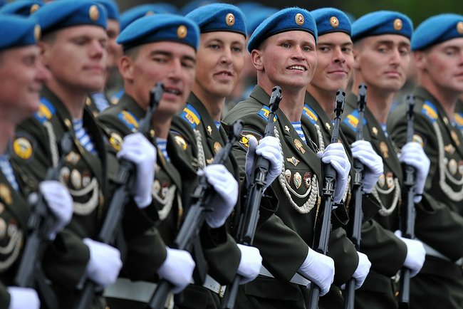 Военный парад в честь 67-й годовщины Победы в Великой Отечественной войне